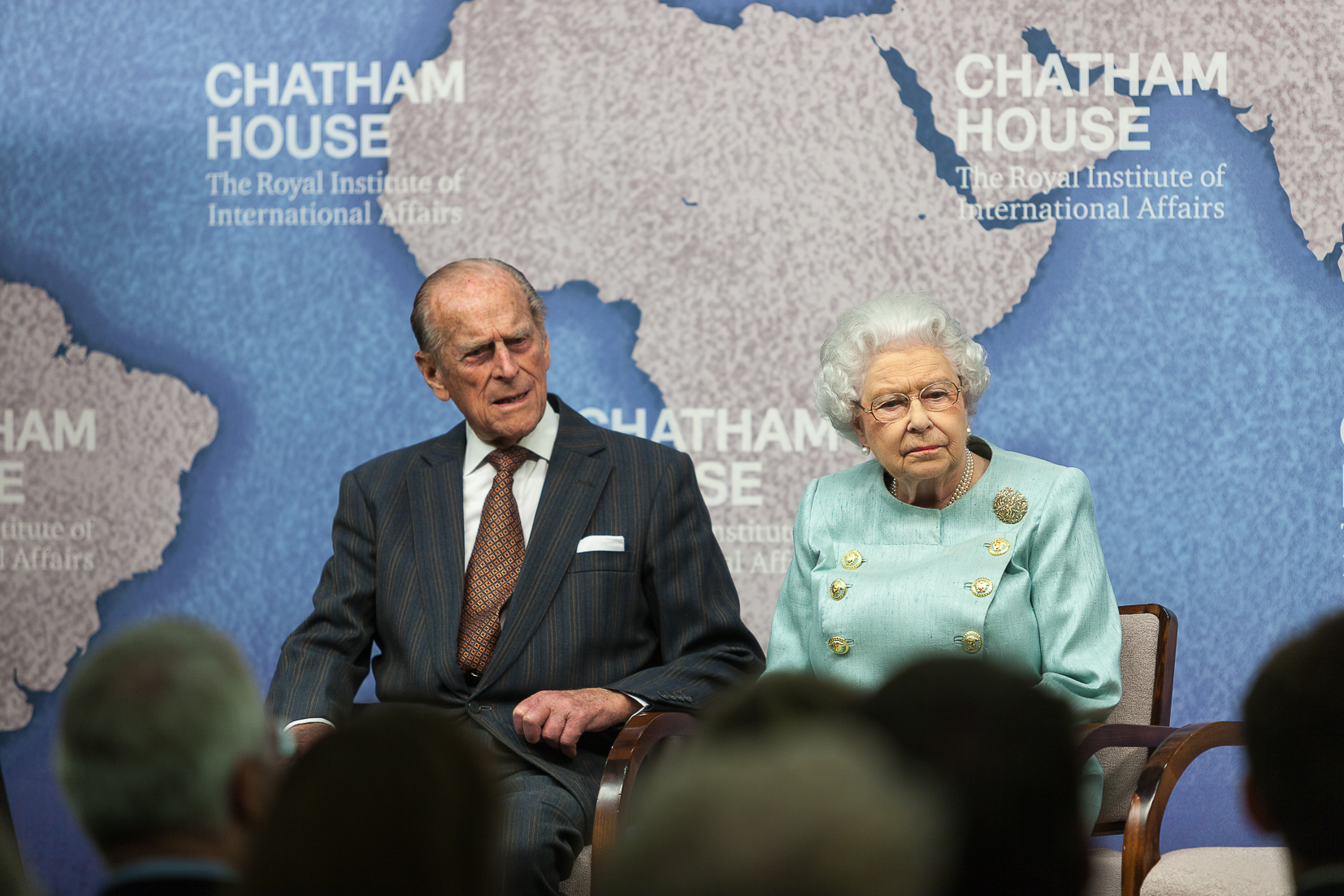 18 November 2014, cht.hm/11ieQ9K